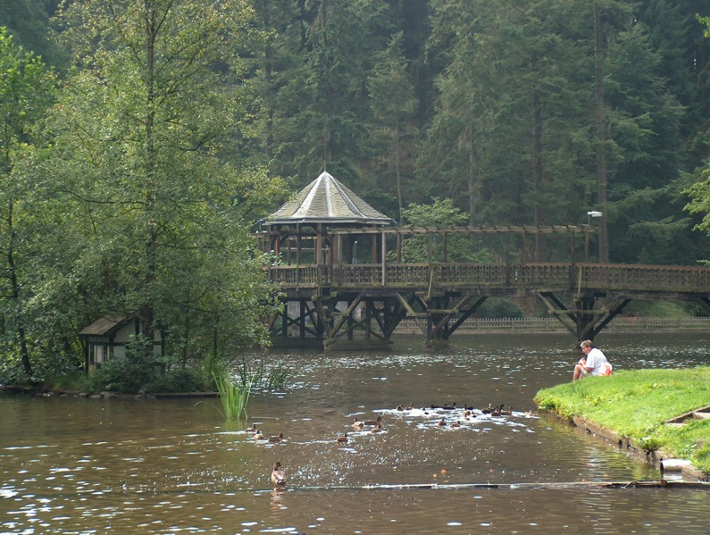 Ülfebad in Radevormwald, fotografiert aus Richtung Unterste Mühle, 2004